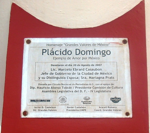 Plácido Domingo's statue in Mexico City